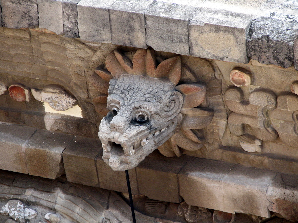 Busto de la serpiente emplumada (Quetzalcóatl) sorprendentemente bien conservado en Teotihuacán. En la pared están grabados relieves marinos de almejas conchas y caracolas.Teotihuacan 07